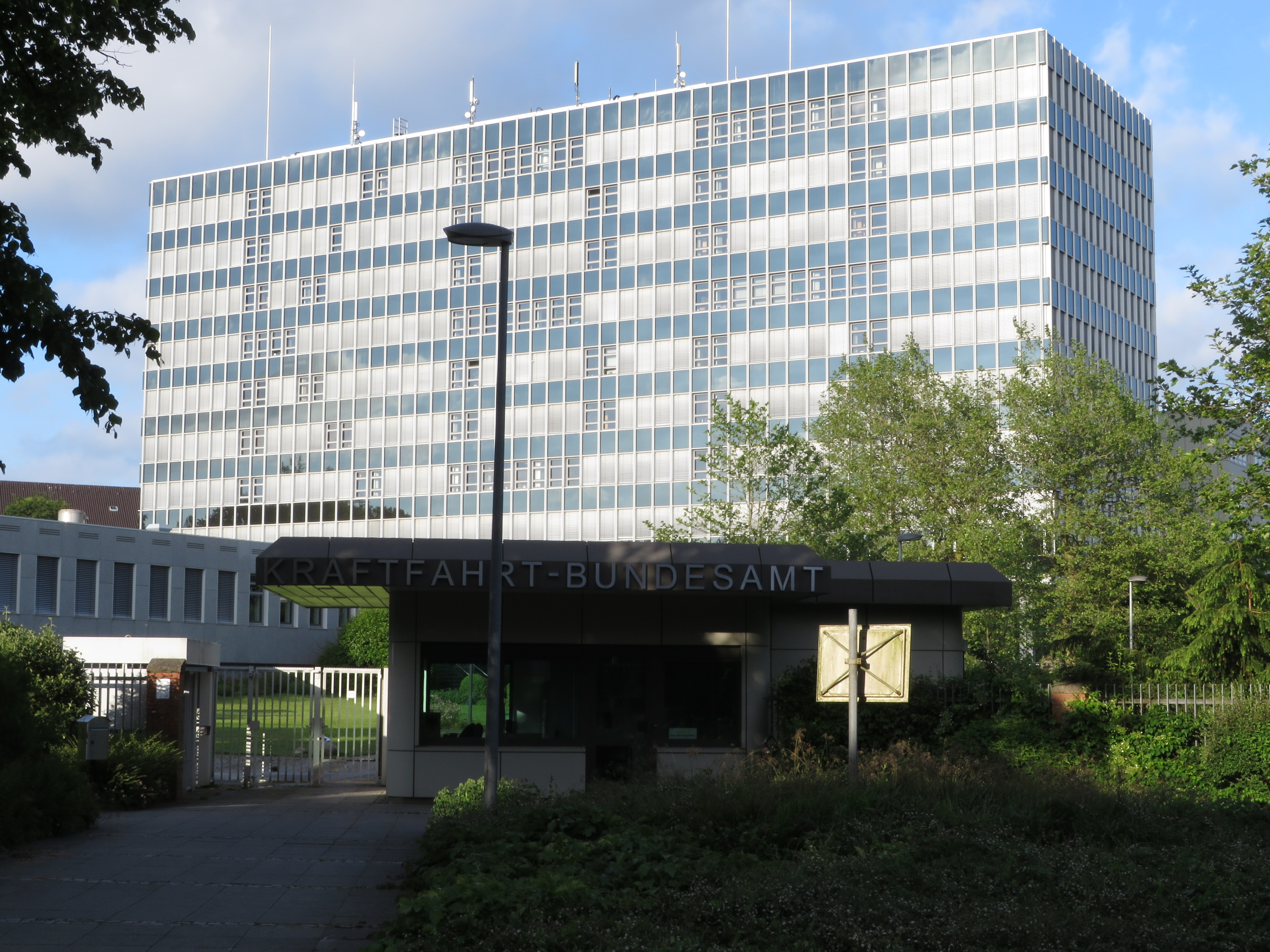 Kraftfahrt-Bundesamt (Fenster mit Rollos bilden an dem Tag Abkürzung KBA), Flensburg-Mürwik Mai 2014, Bild 08